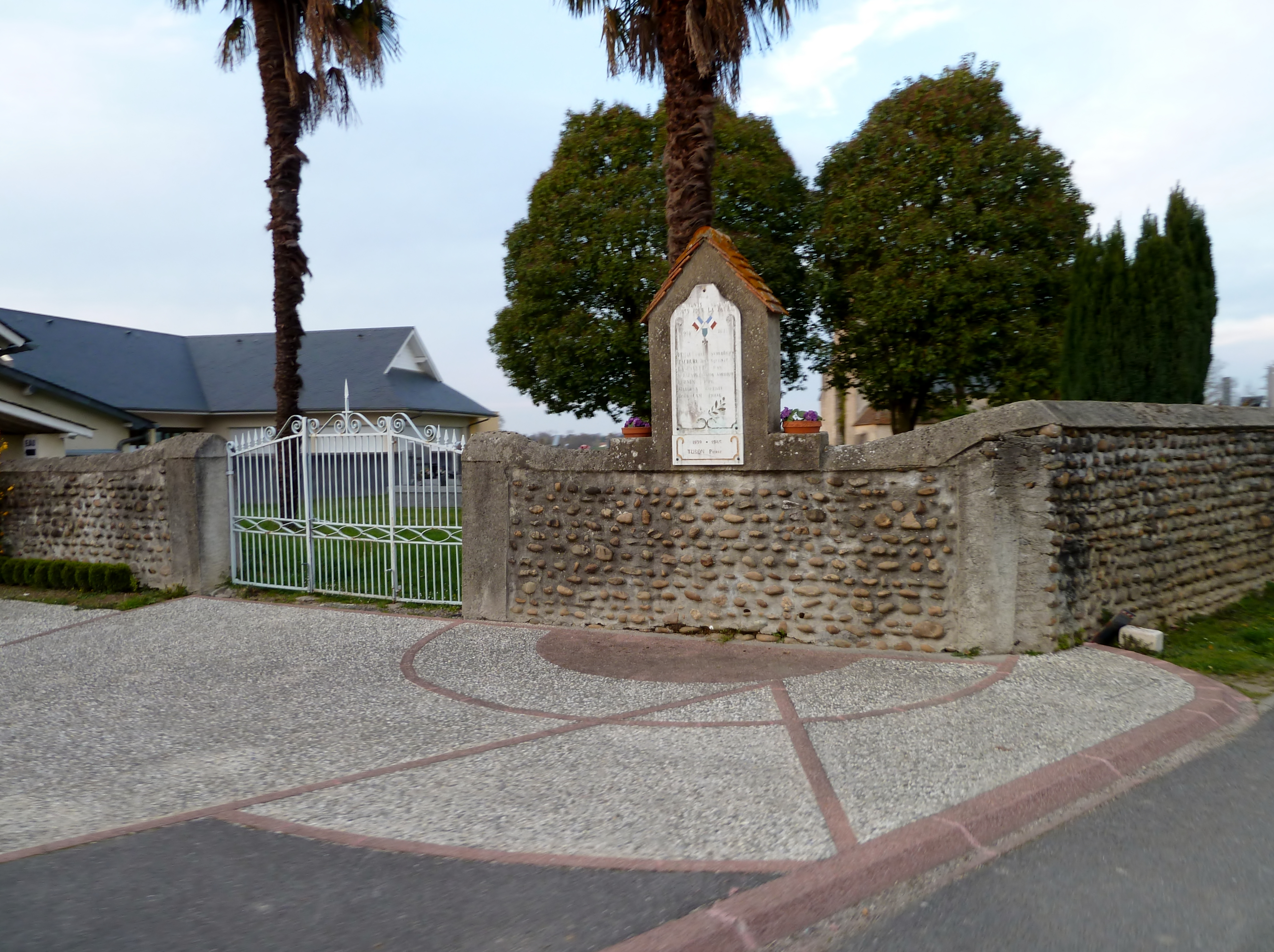 Monument aux morts d'Argelos (Pyrénées-Atlantiques)